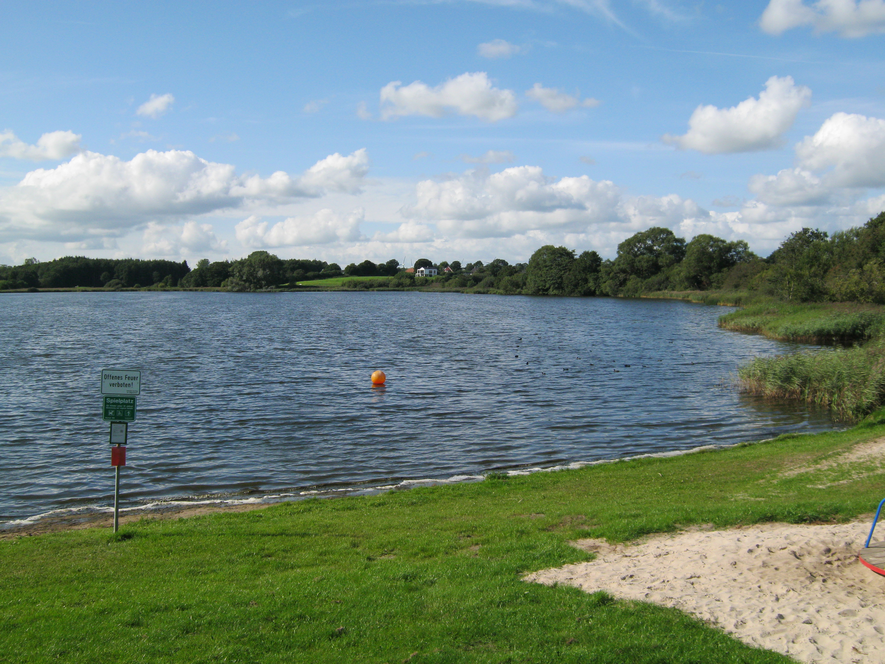 Owschlager See (Kreis Rendsburg-Eckernförde)